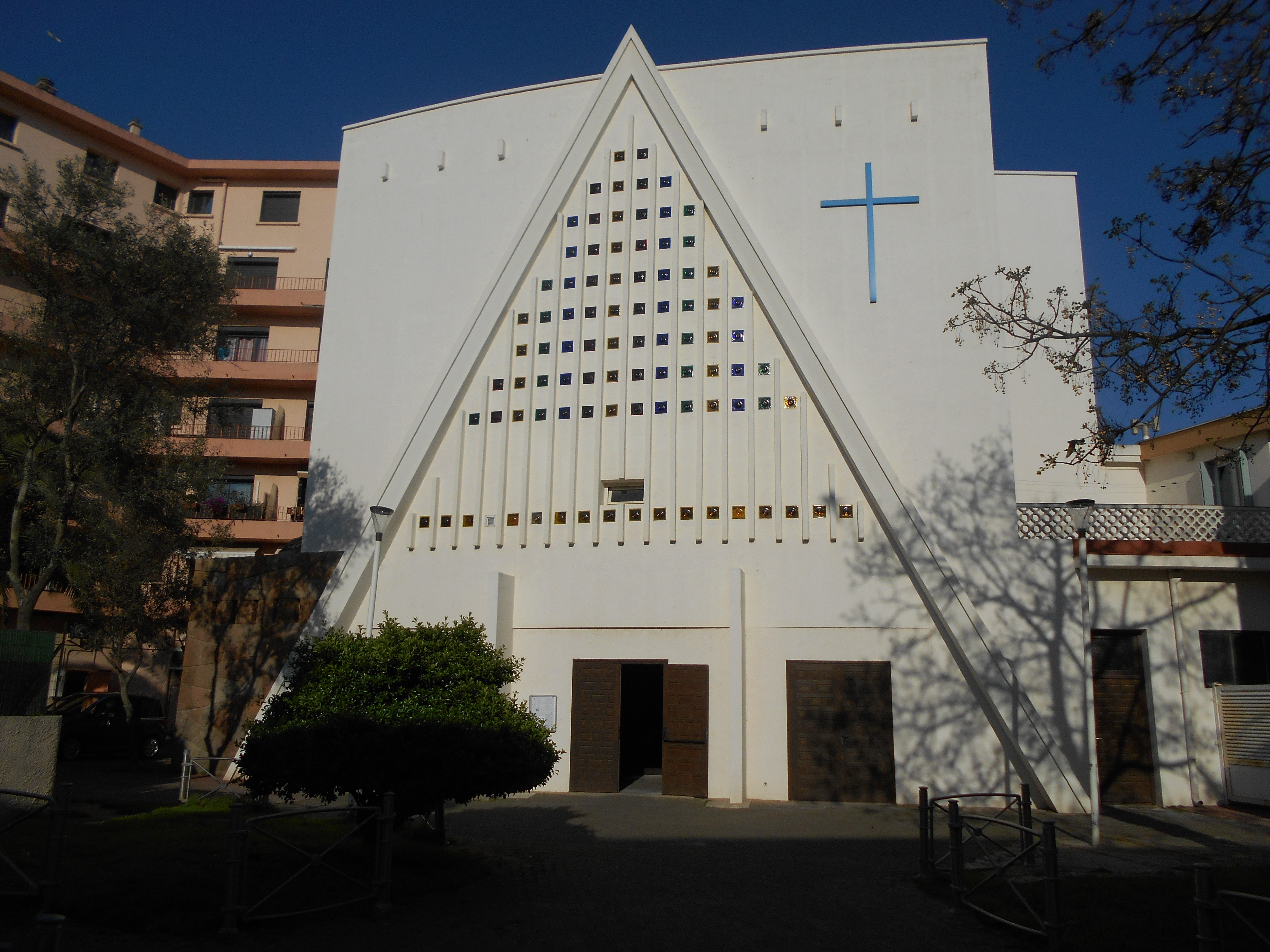 Nostra Senyora de les Onades, de Canet Platja.